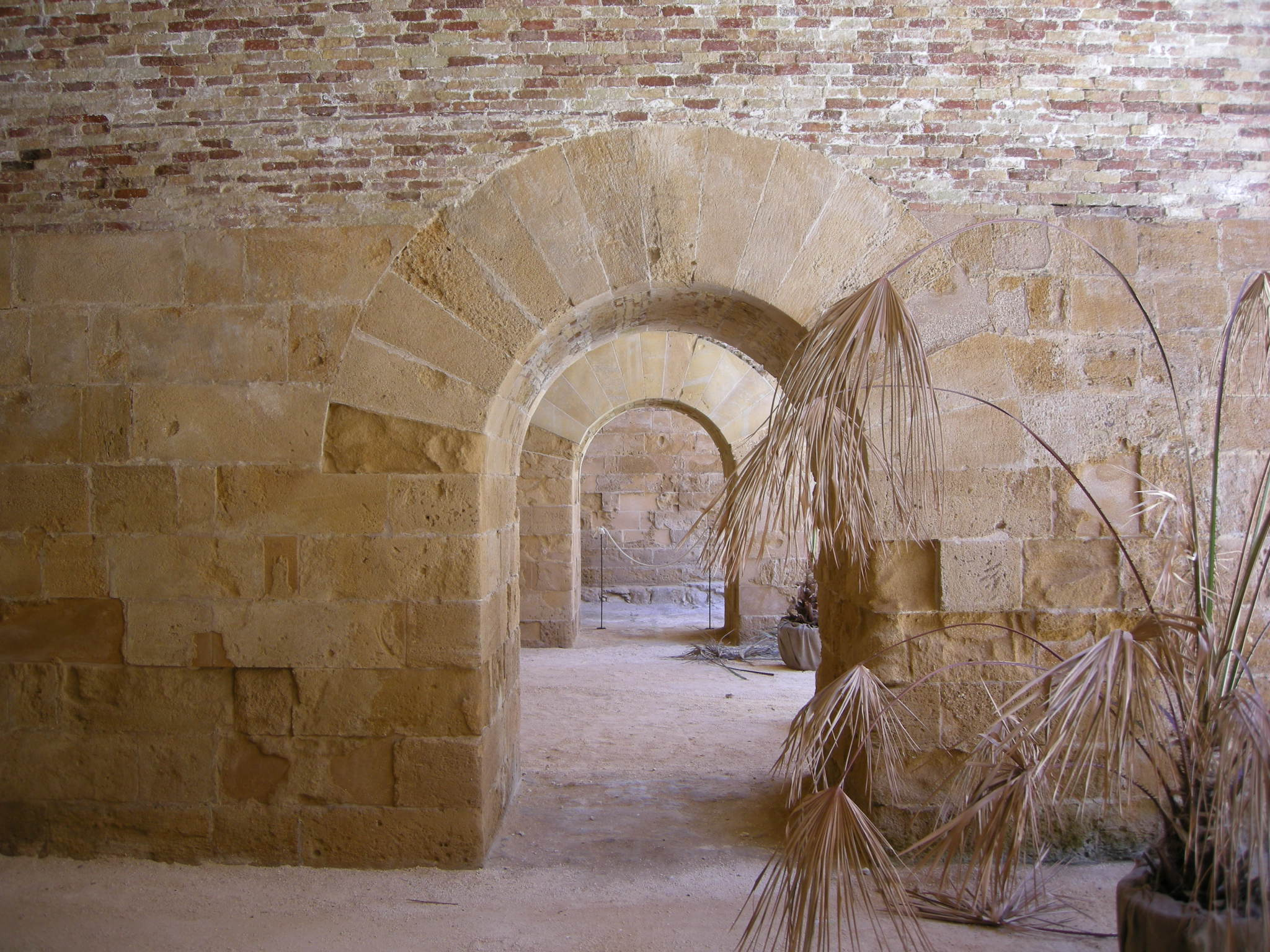 Ortigia, castello maniace, interno, magazzini